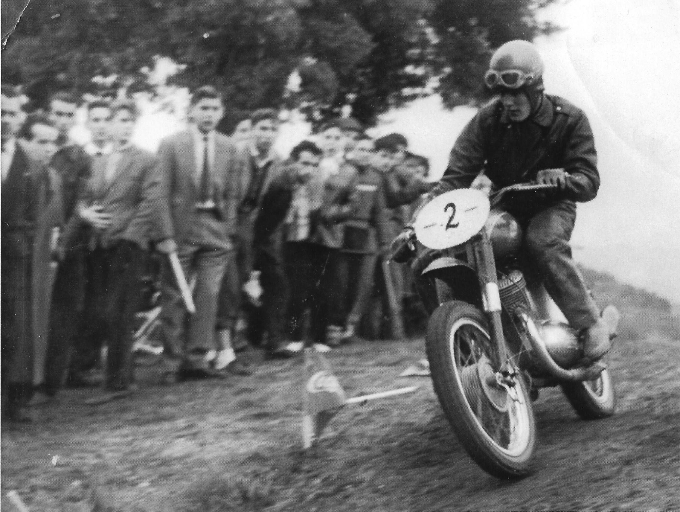 Toni Palau al Motocross de la Casa de Campo de 1959